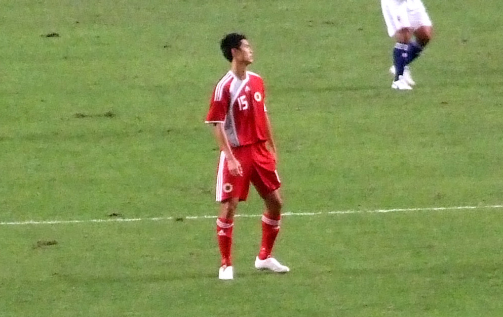 中文（香港）: 陳偉豪